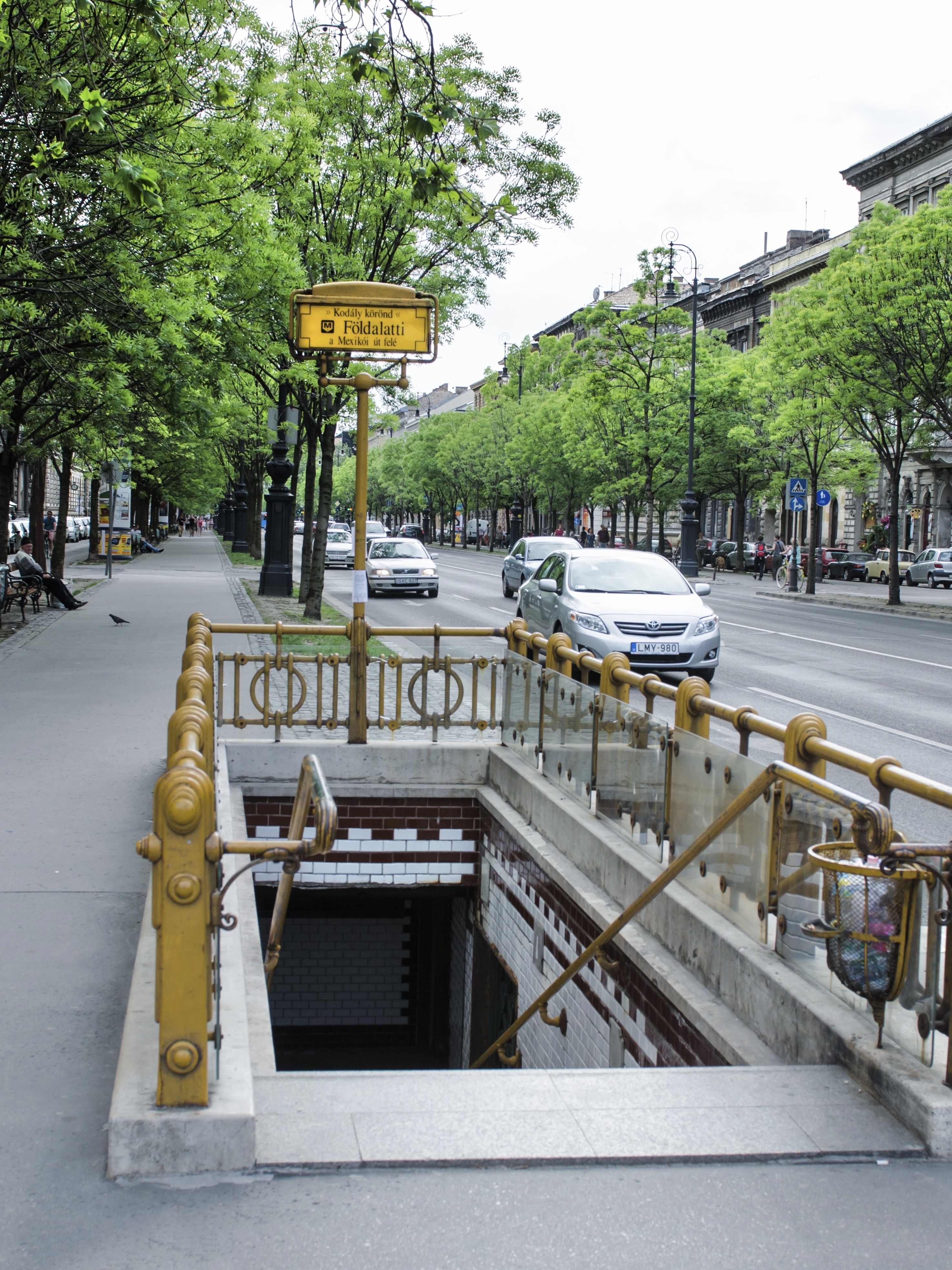 вход в Метро